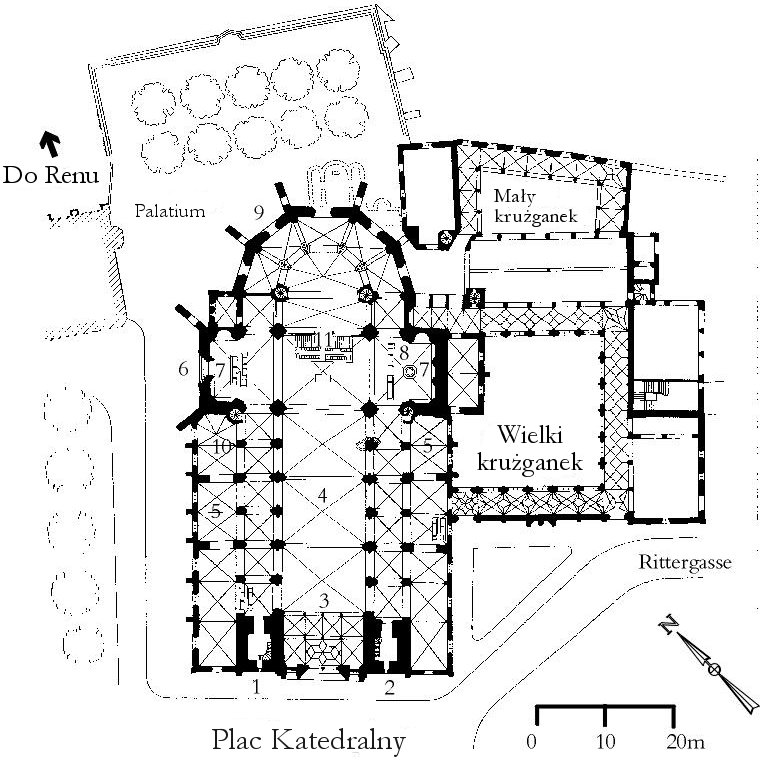 Rysunek katedry bazylejskiej z polskimi opisami